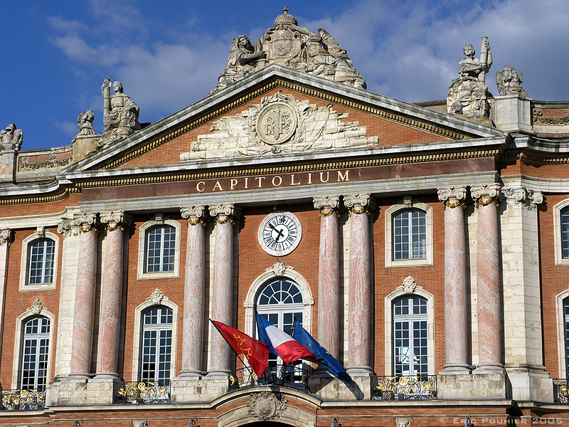 Balcón principal del Capitole FR : Partie Centrale du Capitole, Toulouse, France EN : Capitole Detaile, Toulouse, France Author : -- Eric Pouhier Date : August 2005